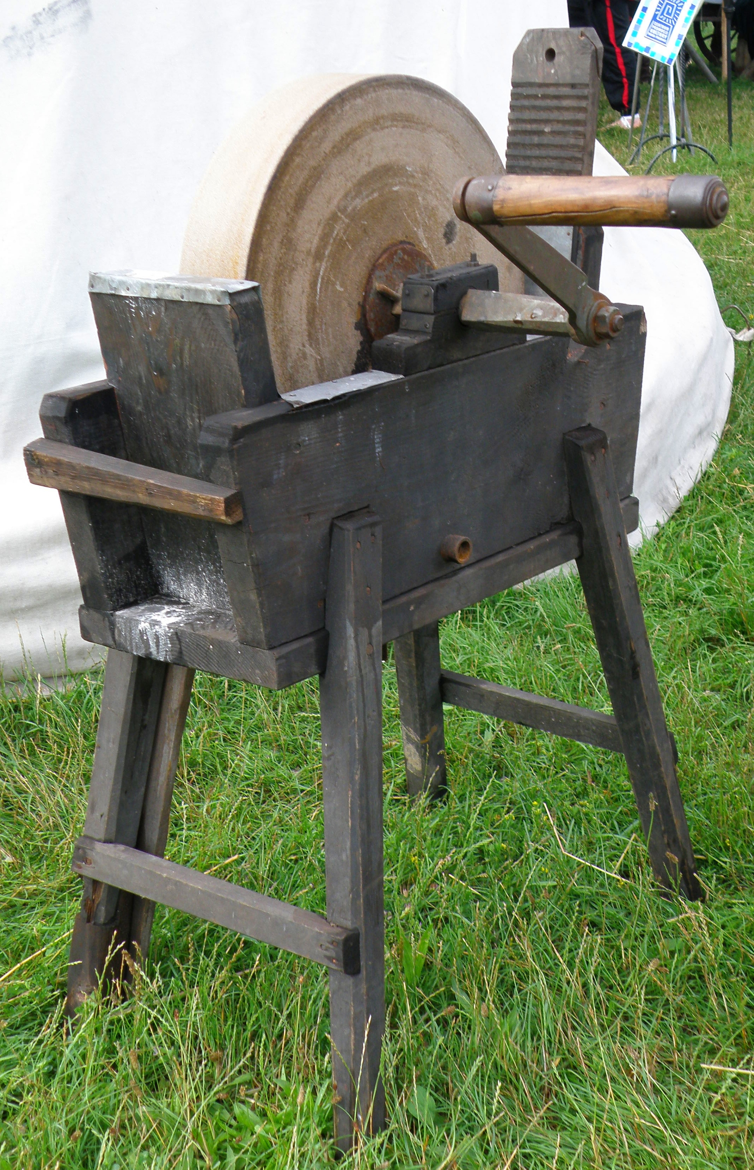 Warszawa, Park Skaryszewski, bitwa polsko-szwedzka o Warszawę z 1656 - obozowisko